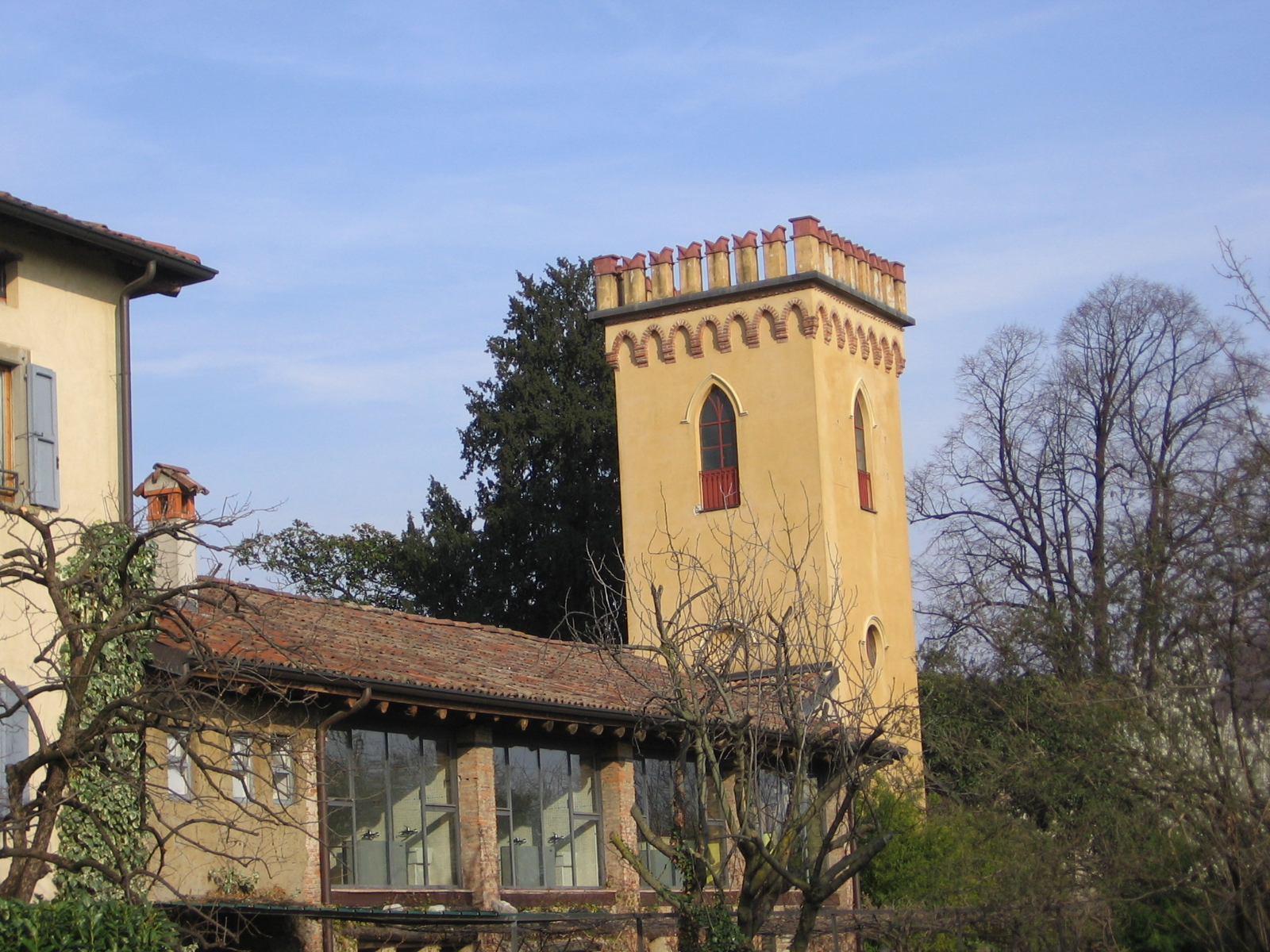 Ranica, Bergamo, Italia